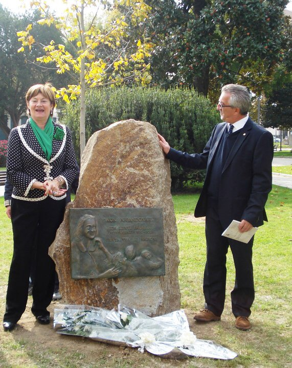 פסל של אידה ושלושת הילדים בגן העיריה במונסליצה